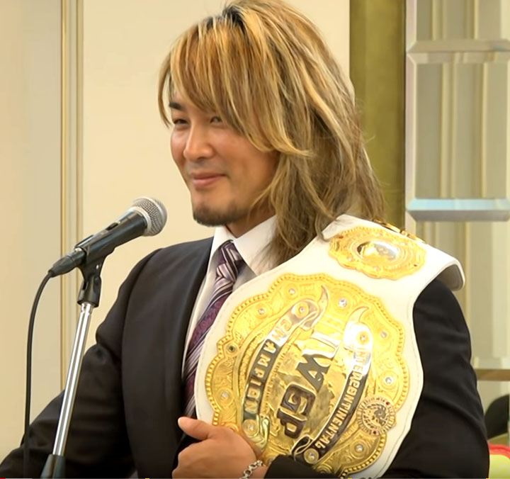 棚橋弘至（G1 CLIMAX 27 公開記者会見にて）